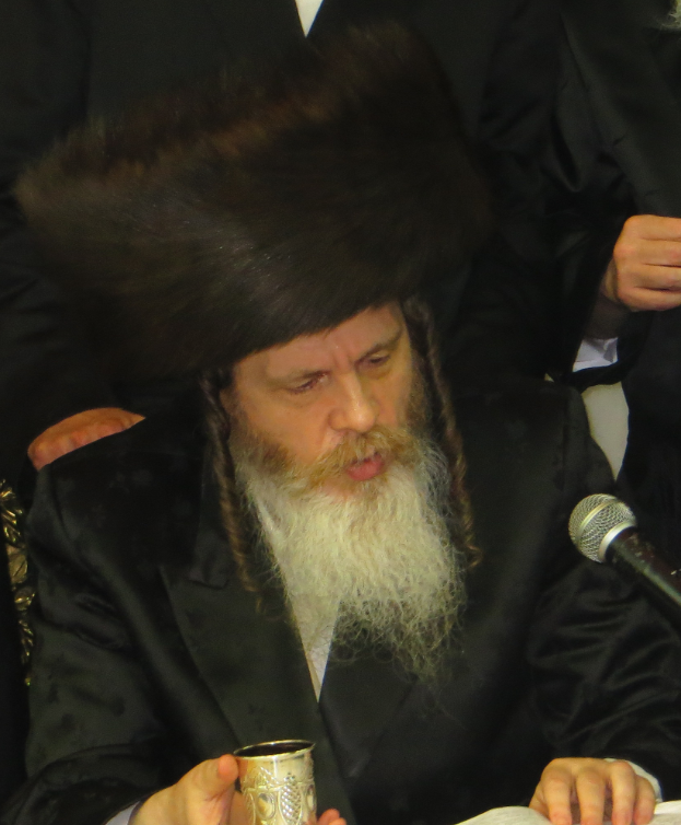 הרב גדליה משה ראטה (רוט), האדמו"ר משומרי אמונים אשדוד